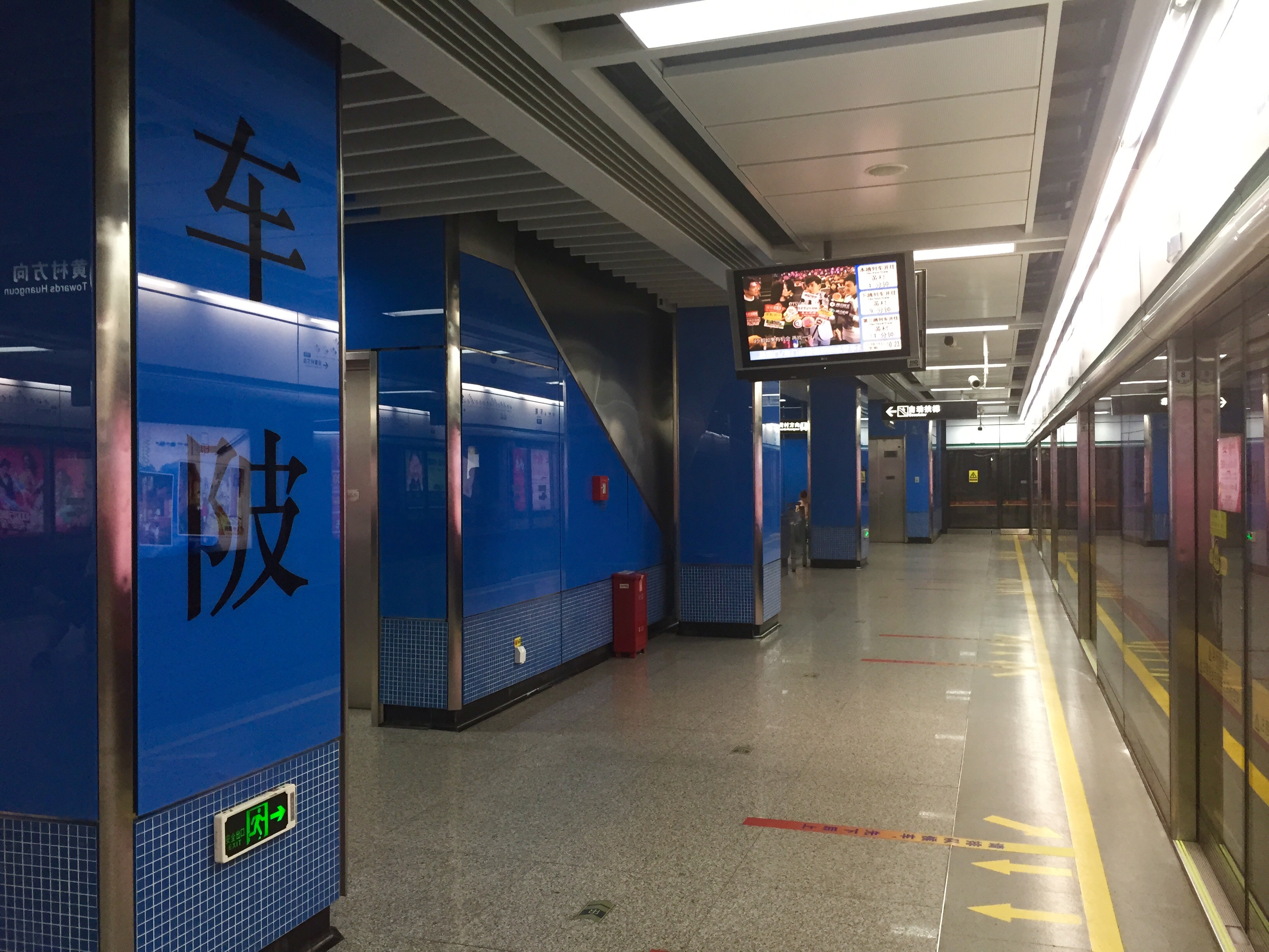 广州地铁车陂站